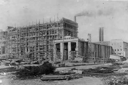 Строительство главного здания Каширской ГРЭС